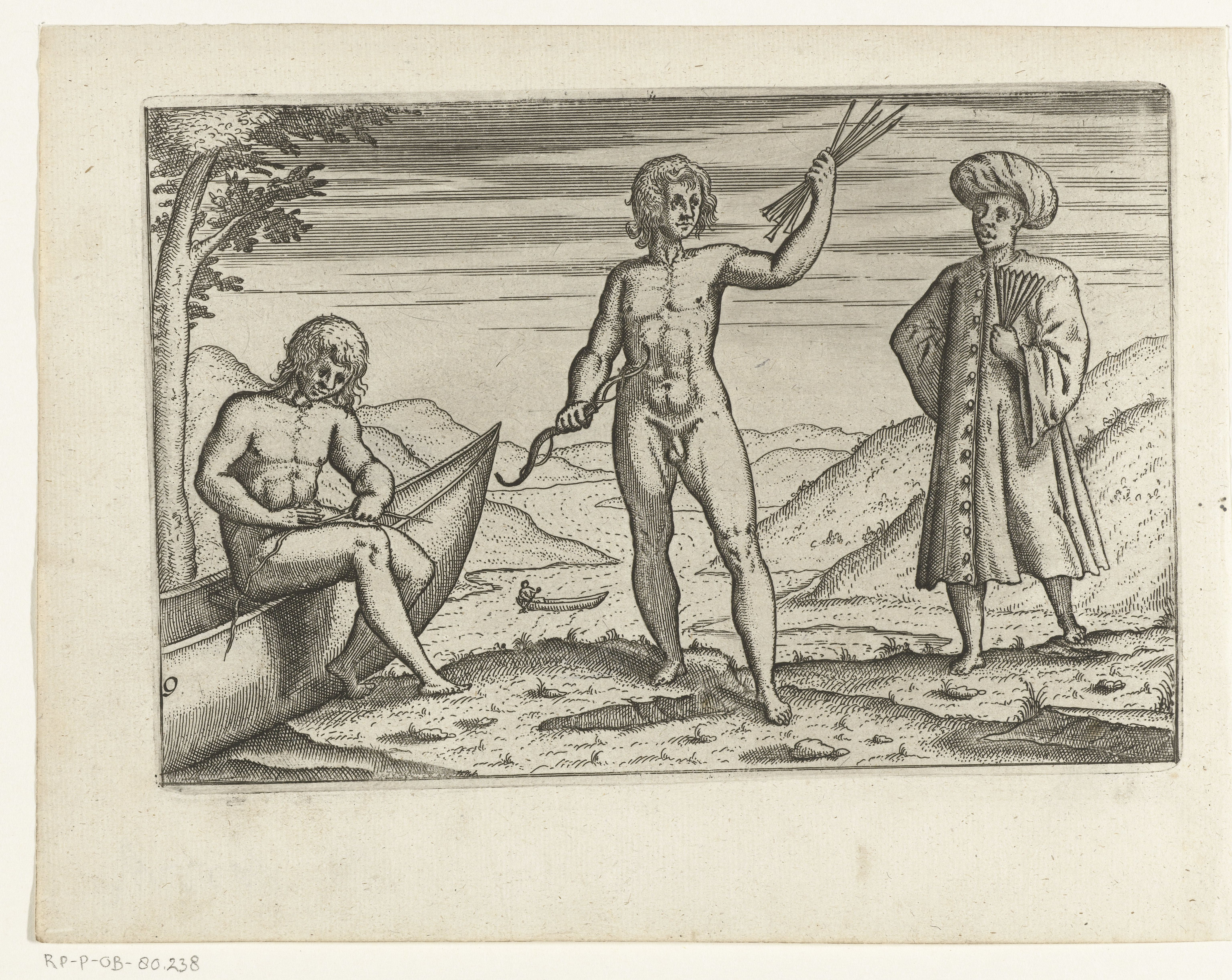 IdentificatieTitel(s): Inwoners van het eiland Pugniatan (Enggano), 1596Objecttype: prent nieuwsprent Objectnummer: RP-P-OB-80.238Catalogusreferentie: FMH 1055-AI(2)/9Atlas van Stolk 982Omschrijving: Drie inwoners van het eiland Pugniatan (Enggano), een eiland bij de Straat van Sunda tussen Sumatra en Java, 1596. Afdrukken van de opgewerkte platen voor de oorspronkelijke illustraties in het reisverslag van de Eerste Schipvaert van Cornelis de Houtman naar Oost-Indië in 1595-1597. No. 9.VervaardigingVervaardiger: prentmaker: anoniemPlaats vervaardiging: Noordelijke NederlandenDatering: 1597 - 1598 en/of 1646Fysieke kenmerken: ets en gravureMateriaal: papier Techniek: etsen / graveren (drukprocedé)Afmetingen: plaatrand: h 145 mm × b 220 mmToelichtingGebruikt als illustratie eerst in: Willem Lodewijcksz, D'eerste boeck. Historie van Indien, waer inne verhaelt is de avontueren die de Hollandtsche schepen bejeghent zijn, Cornelis Claes, Amsterdam 1598. In deze opgewerkte staat gebruikt in: De Eerste Schipvaerd der Hollandsche Natie naer Oost-Indien, waer inne verhaelt wordt al wat haer sonderlings onder wegen bejegent is ... ghetrocken uyt verscheyden Iournalen ofte dagh-registers daer van ghemaeckt, zeer vermaeckelijck ende nut om lesen. Opgenomen in: I. Commelin, Begin ende voortgangh, van de Vereenighde Nederlantsche Geoctroyeerde Oost-Indische Compagnie, J. Janssonius, Amsterdam 1646. Genummerd: 9.OnderwerpWat: exploration, expedition, voyage of discoverylandscapes in tropical and sub-tropical regionsEerste Schipvaert (1595-1597)Wanneer: 1596 - 1596Waar: IndonesiëWie: Cornelis de HoutmanVerwerving en rechtenVerwerving: aankoop 1881Copyright: Publiek domein